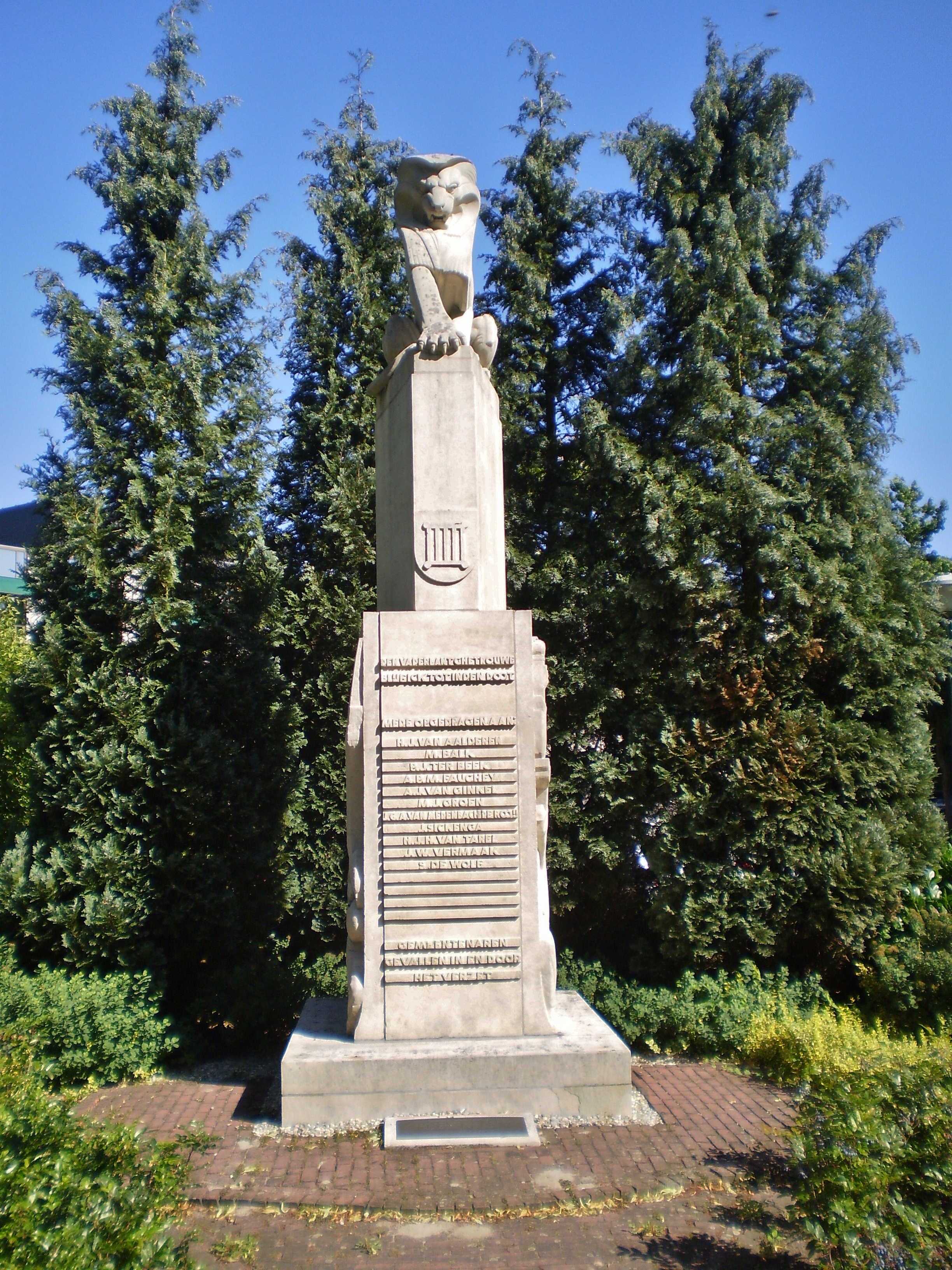 Jagtlust monument